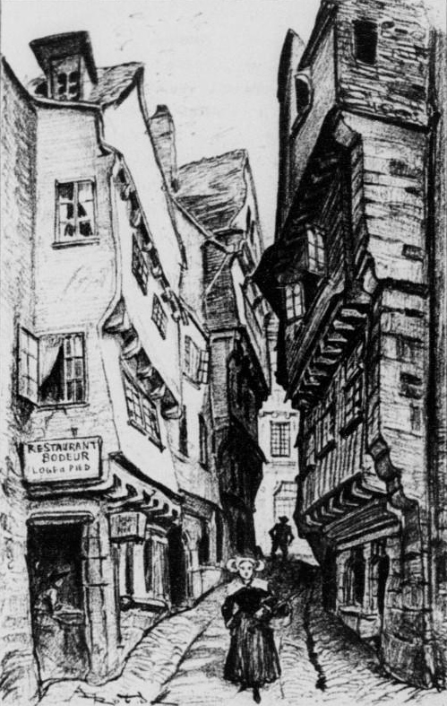 Morlaix : la Venelle au son (lithographie d'Albert Robida publiée dans "La vieille France" vers 1900)